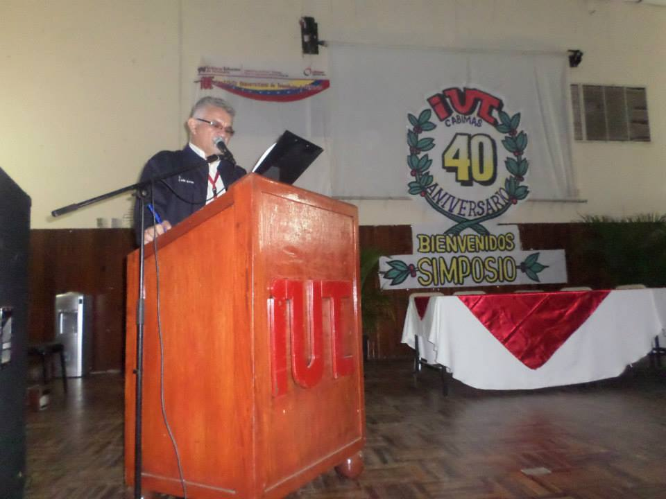 auditorio discurso